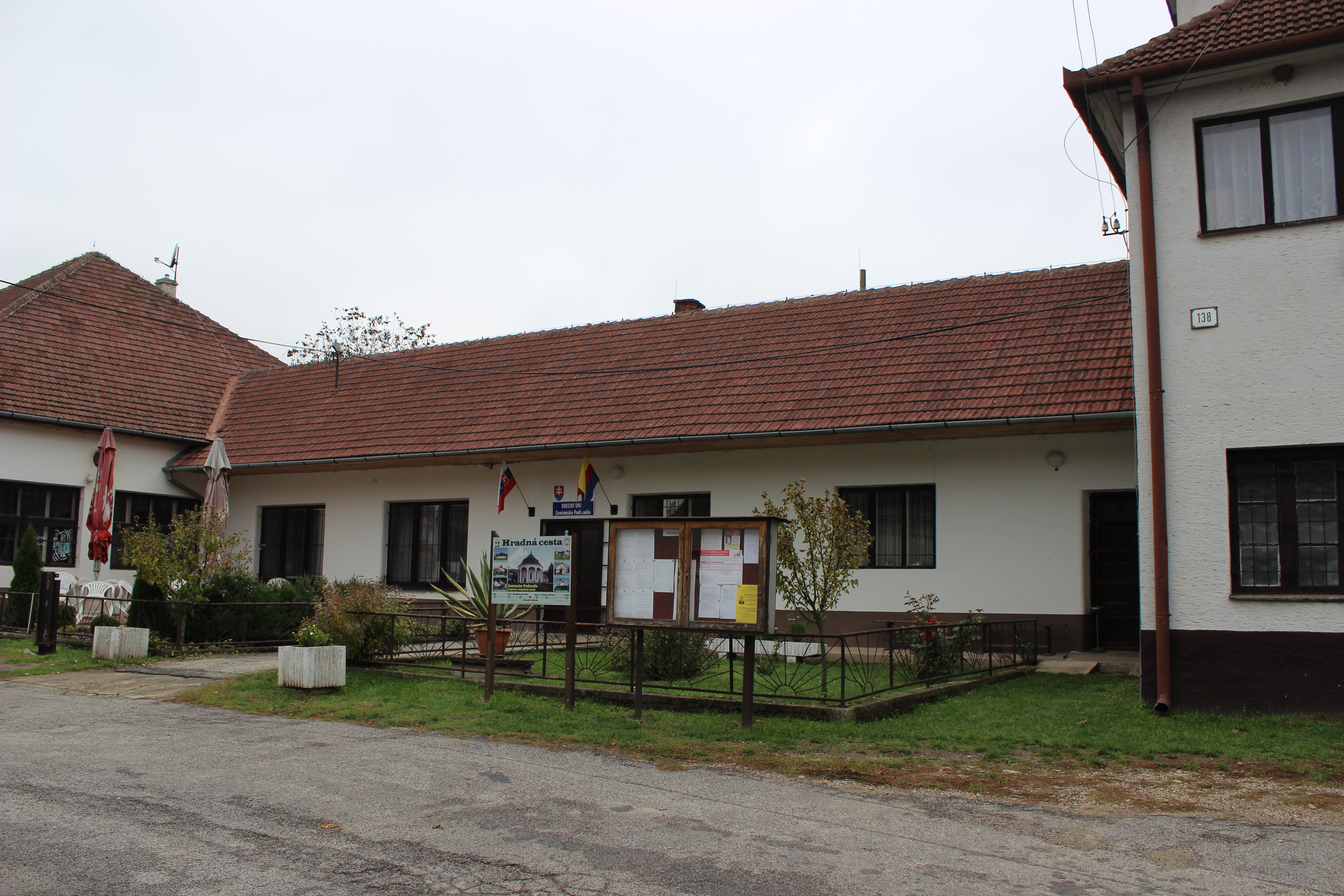 Budova obecního úřadu v Zemianskem Podhradie.